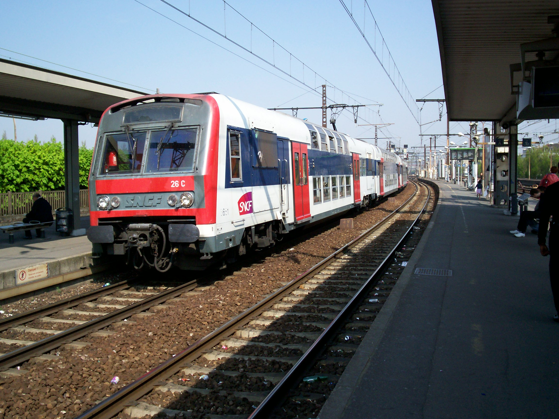 Z5600 à Villeneuve Saint Georges